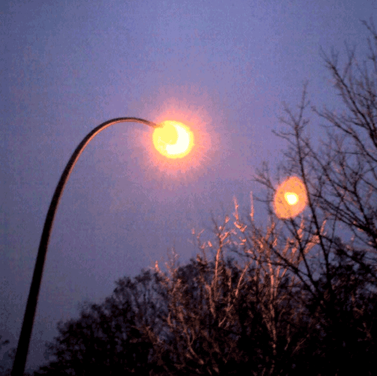 Eine Straßenbeleuchtung mit Natriumdampflampe